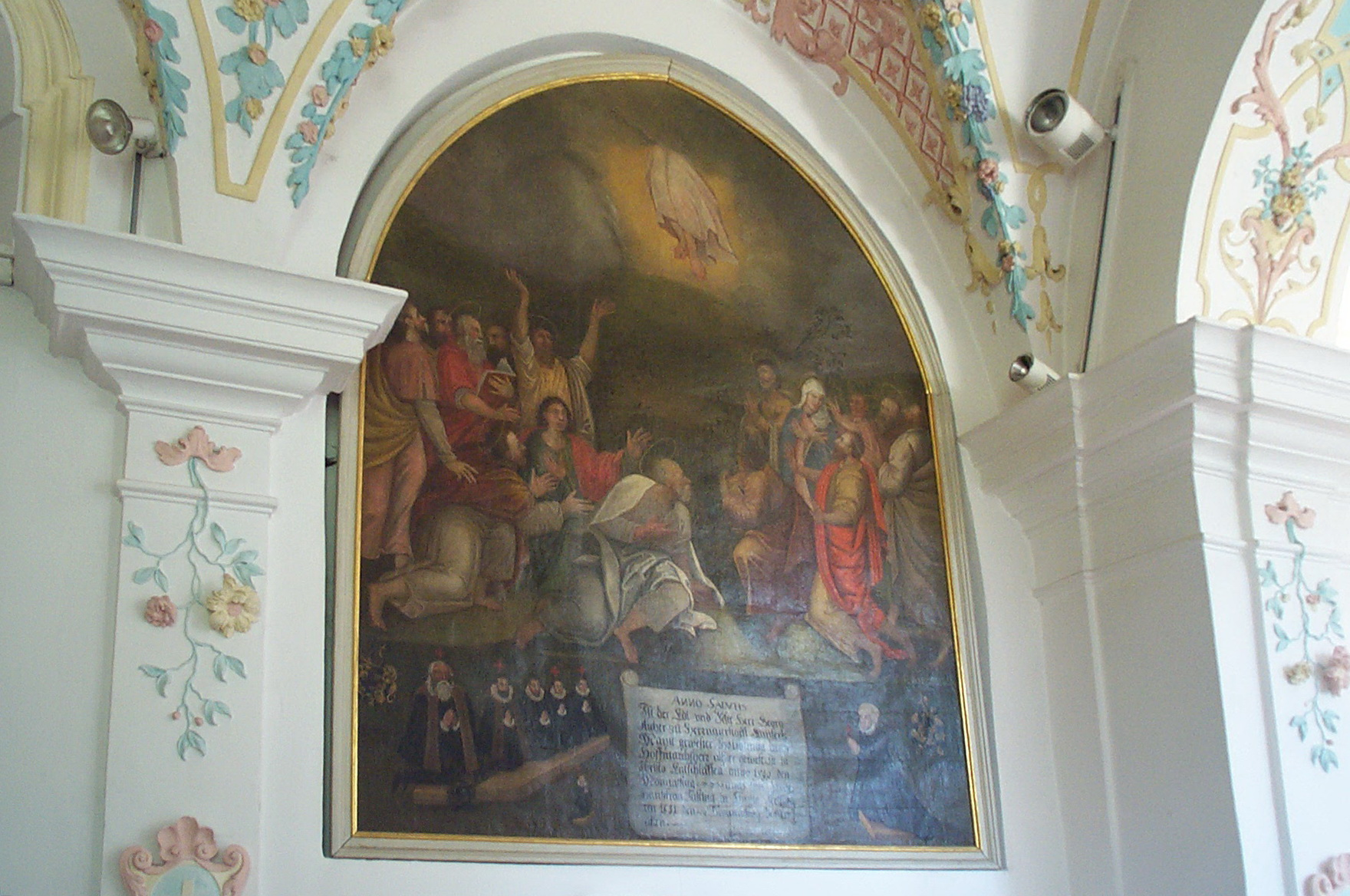 Herrngiesdorf, Bernhardstraße 23-25. Katholische Kirche St. Martin. Großes Bild der Himmelfahrt Christi auf Leinwand aus dem Jahr 1600. Dargestellt wird die Himmelfahrt Christi. Darunter kniet die Stifterfamilie von Georg Aicher zu Herrngiersdorf, kaiserlicher Hauptmann und Hofmarksherr und dessen Hausfrau Justina.